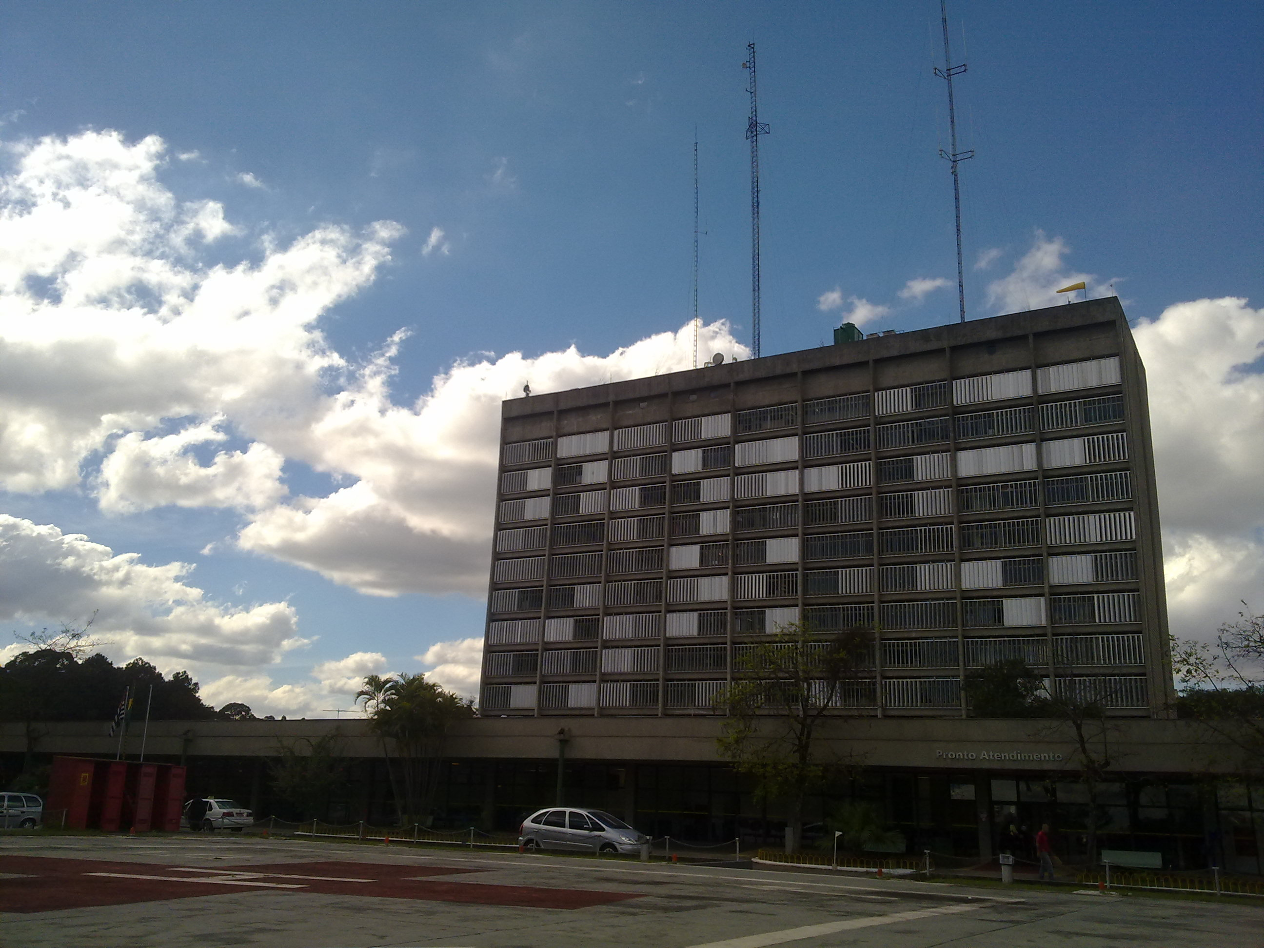 Foto do Hospital da Polícia Militar de São Paulo localizado no distrito do Tucuruvi, Zona Norte da cidade brasileira de São Paulo.